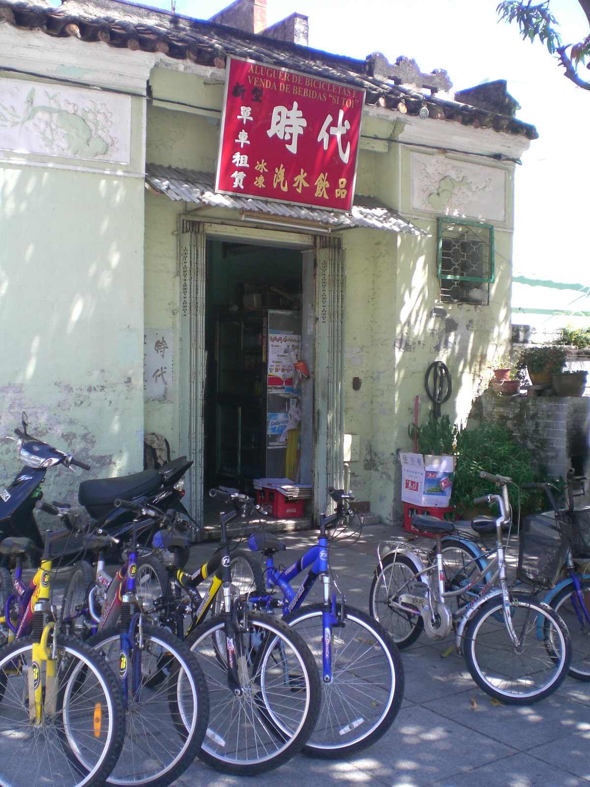 自行車出租.